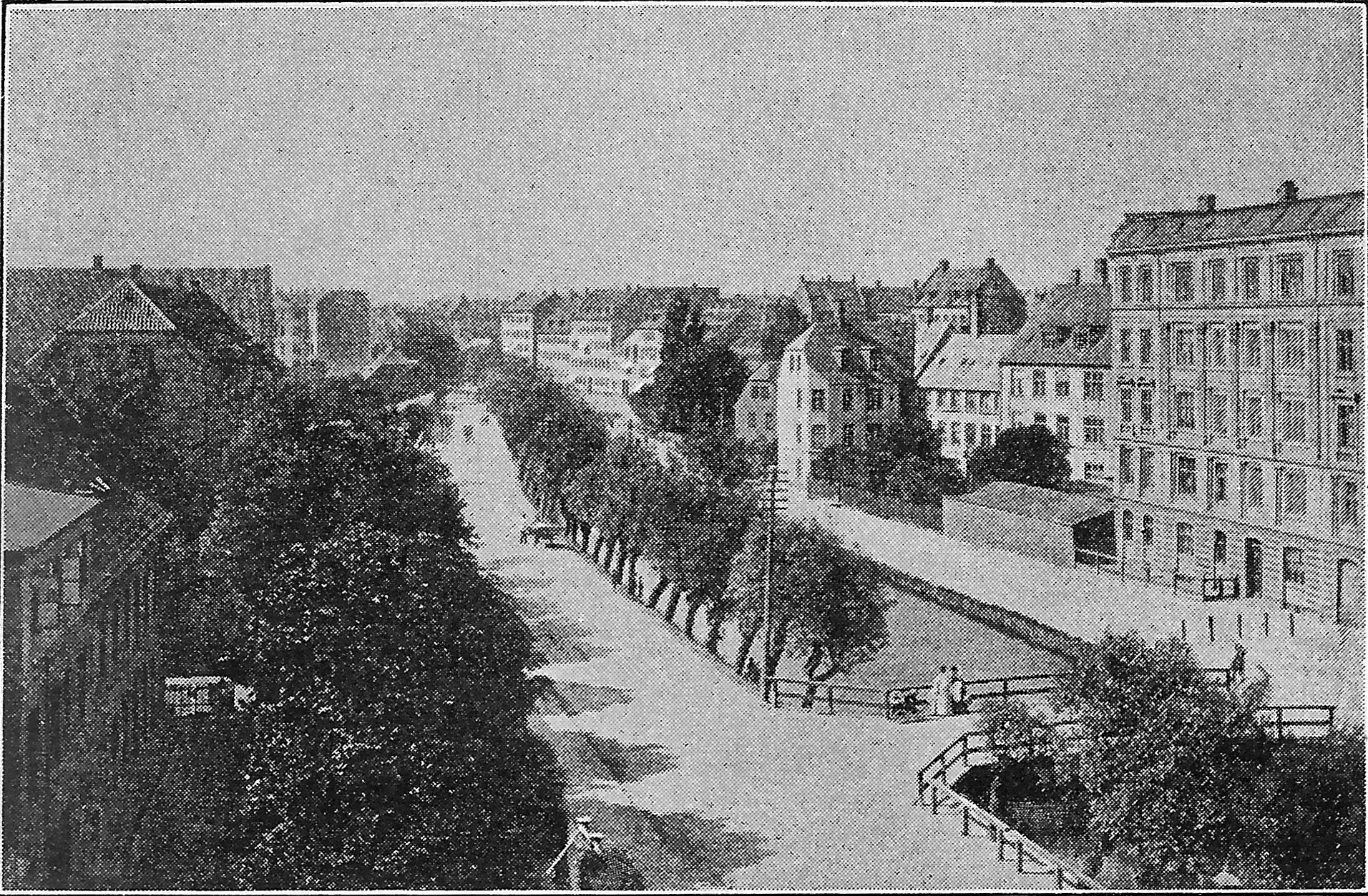 Ladegårdsåen med Ladegården til venstre.